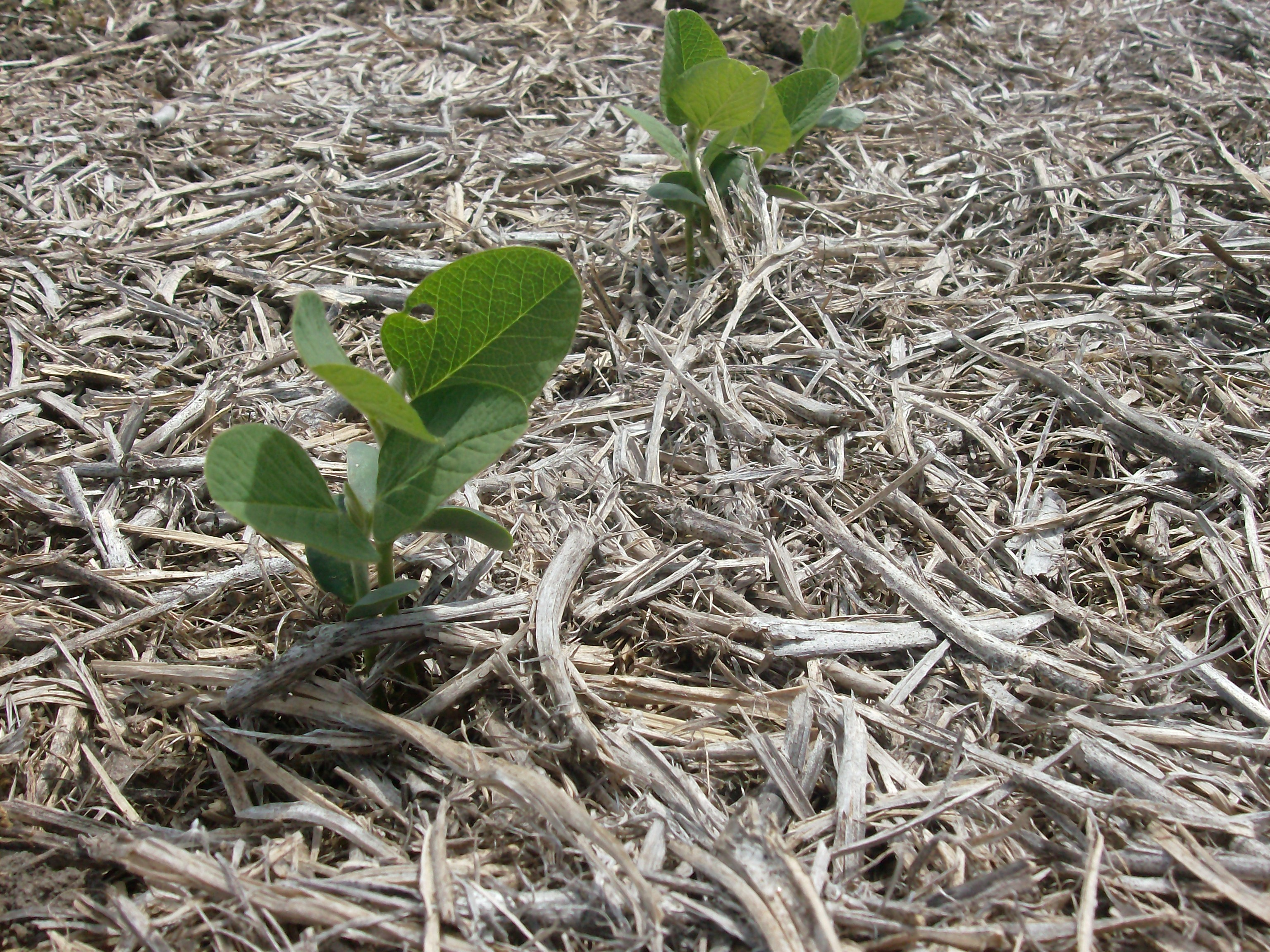 En la foto se puede ver una planta de Soja sembrada bajo siembra directa sobre un rastrojo de Soja. La foto fue tomada en Zarate, Provincia de Buenos Aires, Argentina.